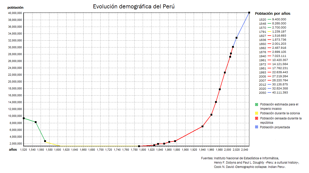 cuadro de la evolución demográfica del Perú, desde el periodo anterior a la conquista hasta la proyección del INEI para 2050